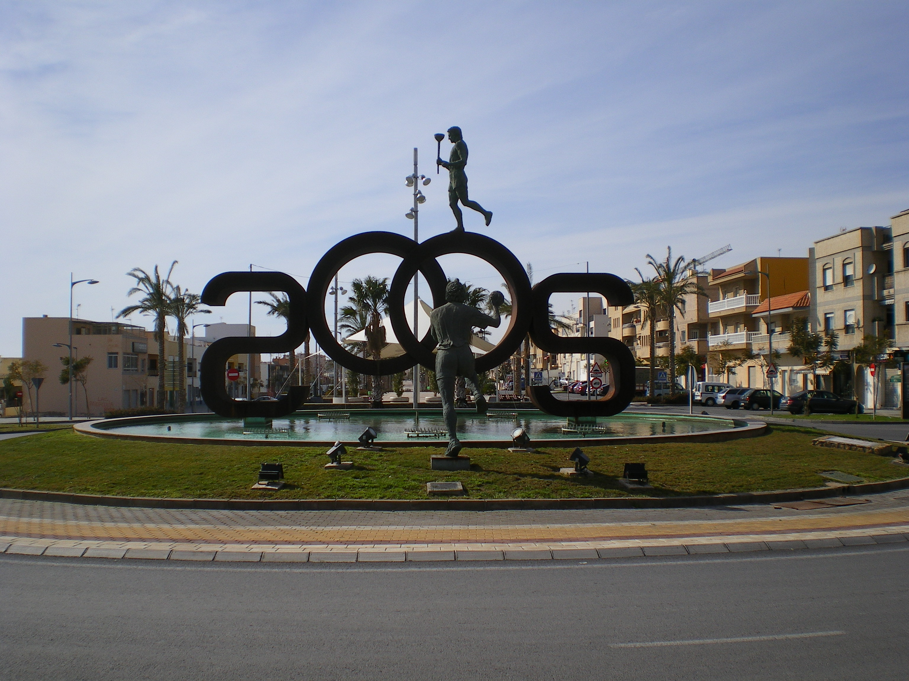 Rotonda con monumento a los Juegos del Meditrráneo de 2005 celebrados en Almería, ubicada en el bulever ciudad de Vícar, España, a la altura de las Cabañuelas.